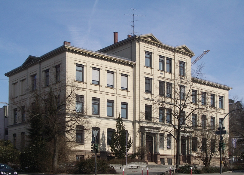 Ravensburg, Germany: Realschule Ravensburg (Wilhelmstraße), erbaut 1881/1882, 1902–1904 erhöht